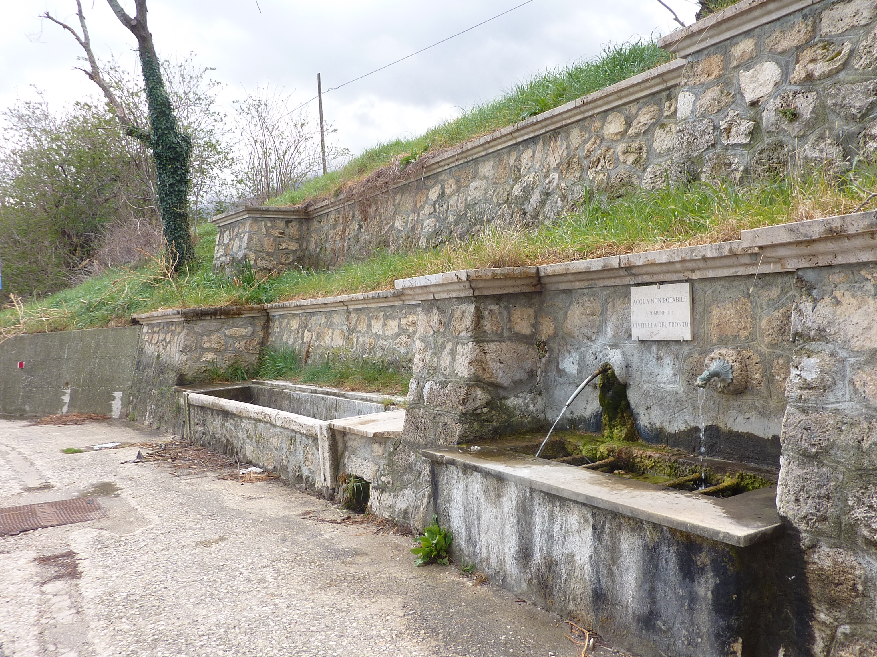 il lavatoio pubblico di Rocche era anche centro di aggregazione per le donne e di diffusione delle notizie del paese